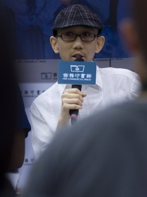 中文（香港）: 譚劍在香港尖沙咀美麗華商務印書務的活動。